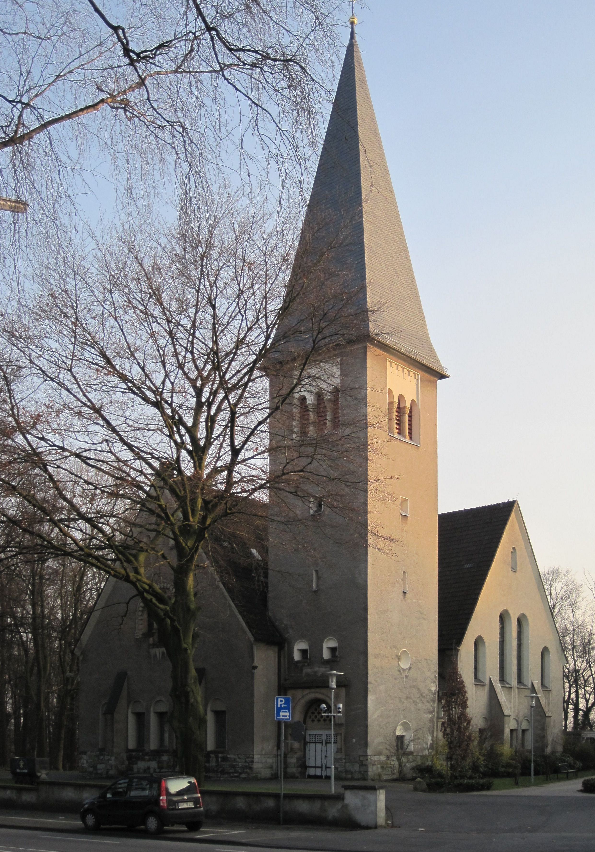 Das Foto zeigt die Kreuzkirche in Hamm-Bockum-Hövel.